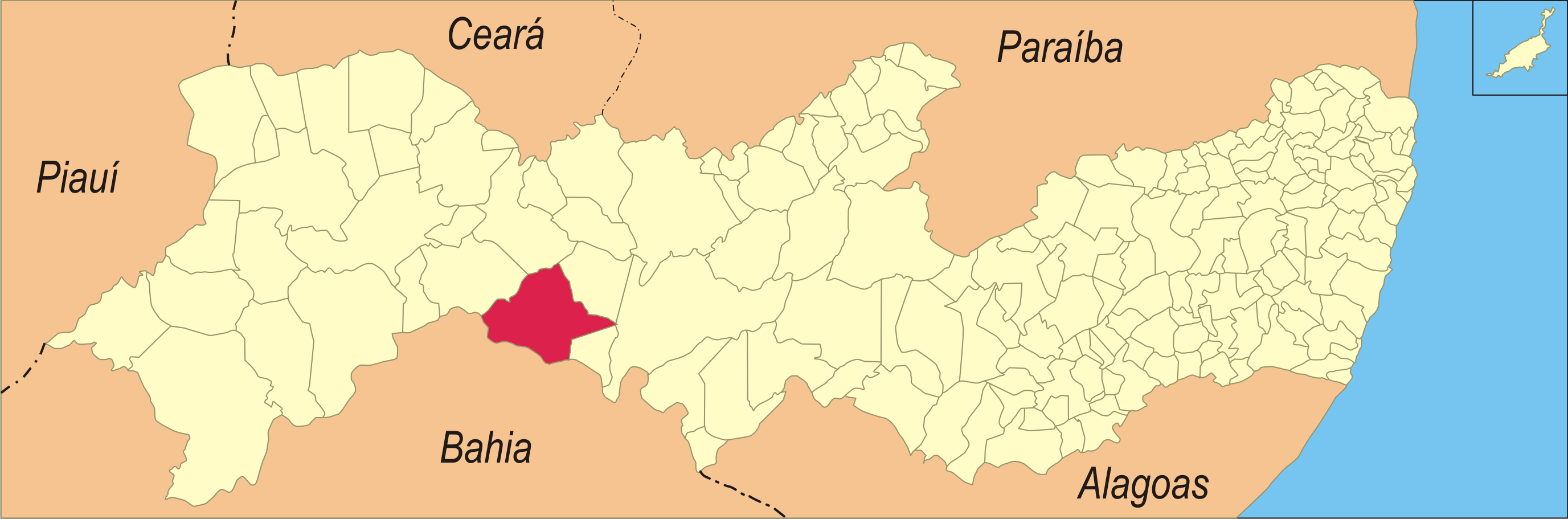 Localização da cidade no estado de Pernambuco